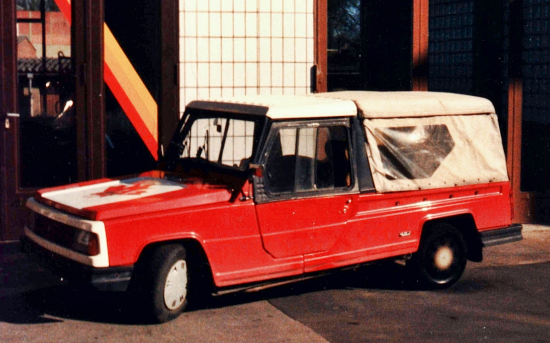 Das Bild zeigt einen Renault 6 Rodeo und würde zum Artikel "Renault 4" passen